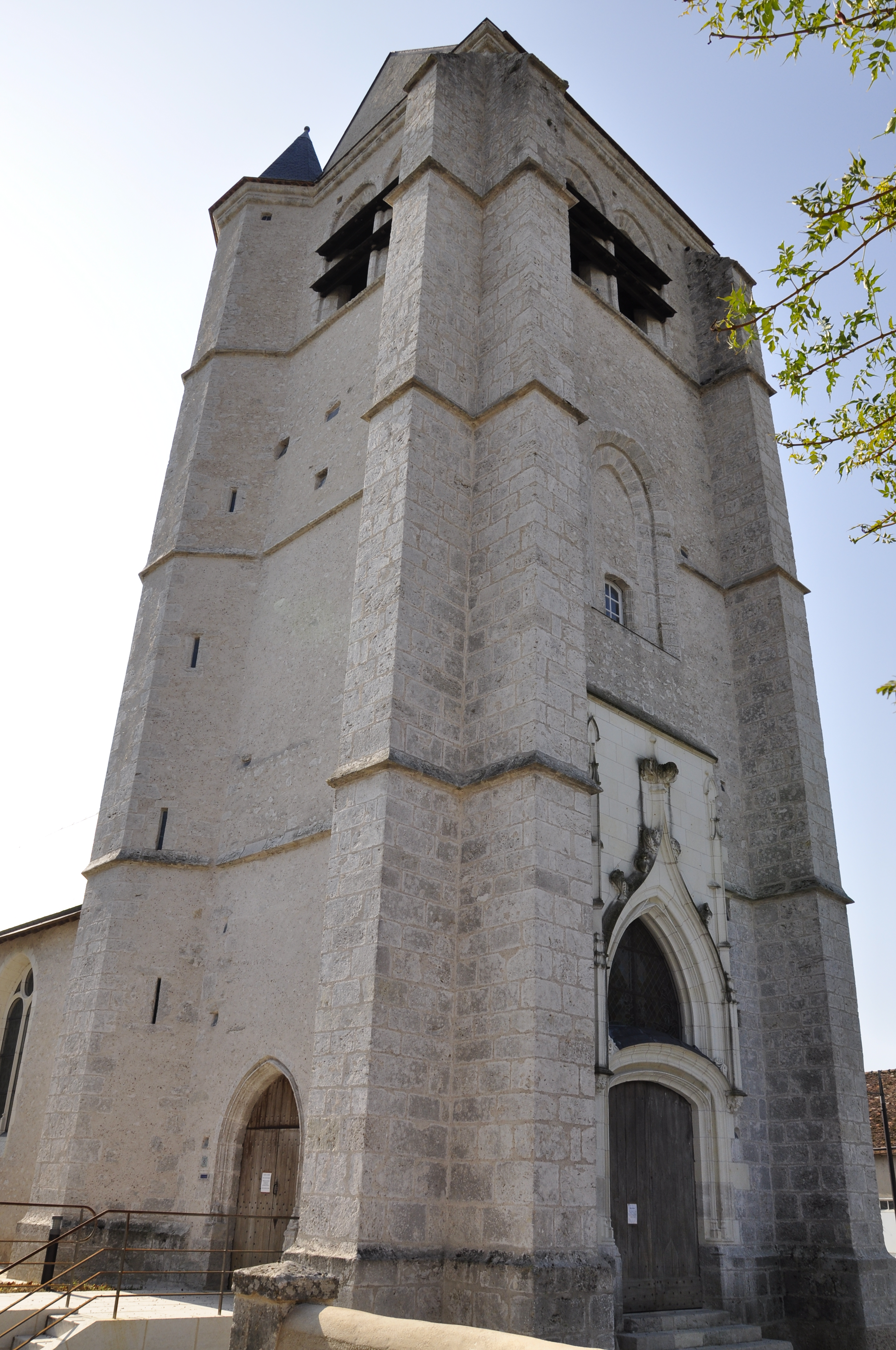 Église Saint-Pierre de Montlivault